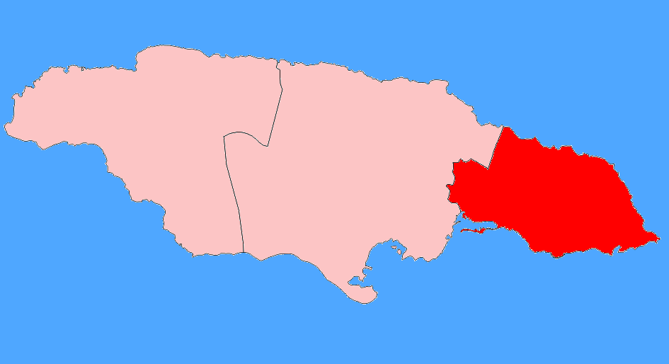 Mapa resaltando al condado jamaiquino de Surrey.